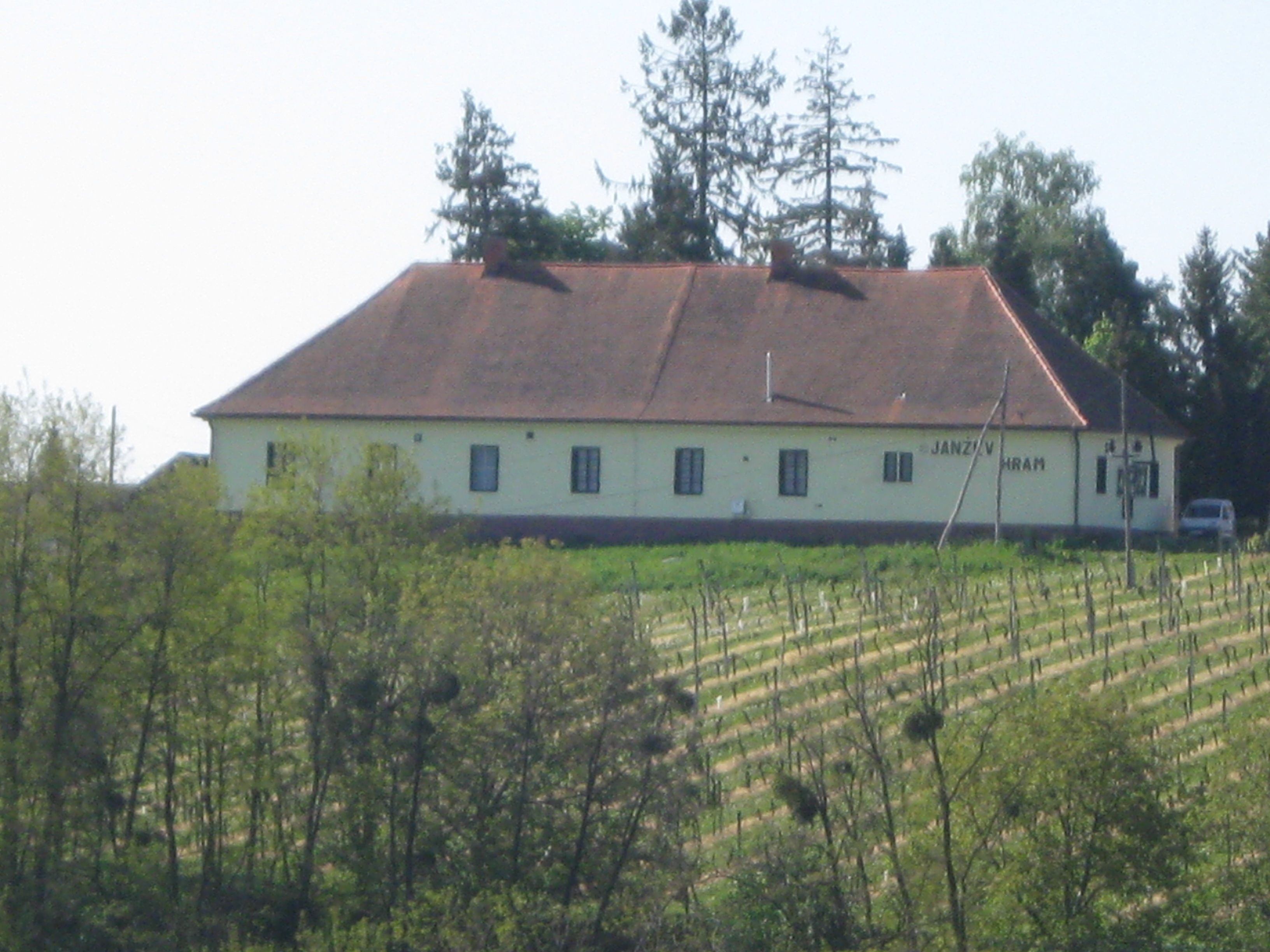 Podkletena zidanica z ohranjeno prešo, zgrajena je bila v sredini 19. stol. Vpisana v register nepremične kulturne dediščine pod št. 986